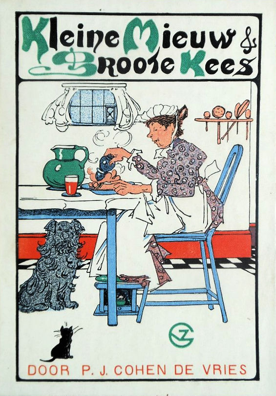 "Kleine Mieuw en Groote Kees" (1923) van P.J. Cohen de Vries. Boekband getekend door Bas van der Veer.